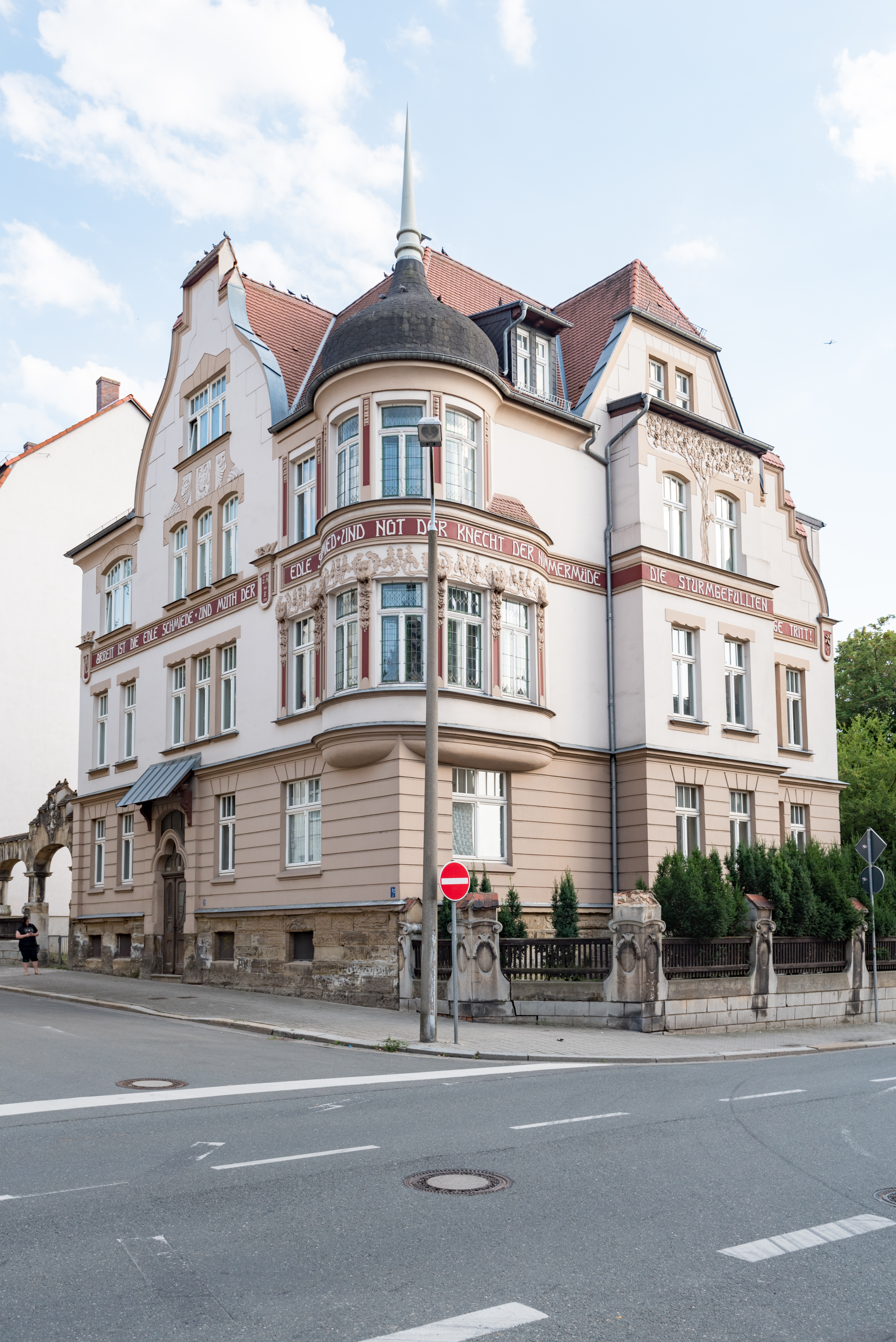 Zeitz, August-Bebel-Straße 66